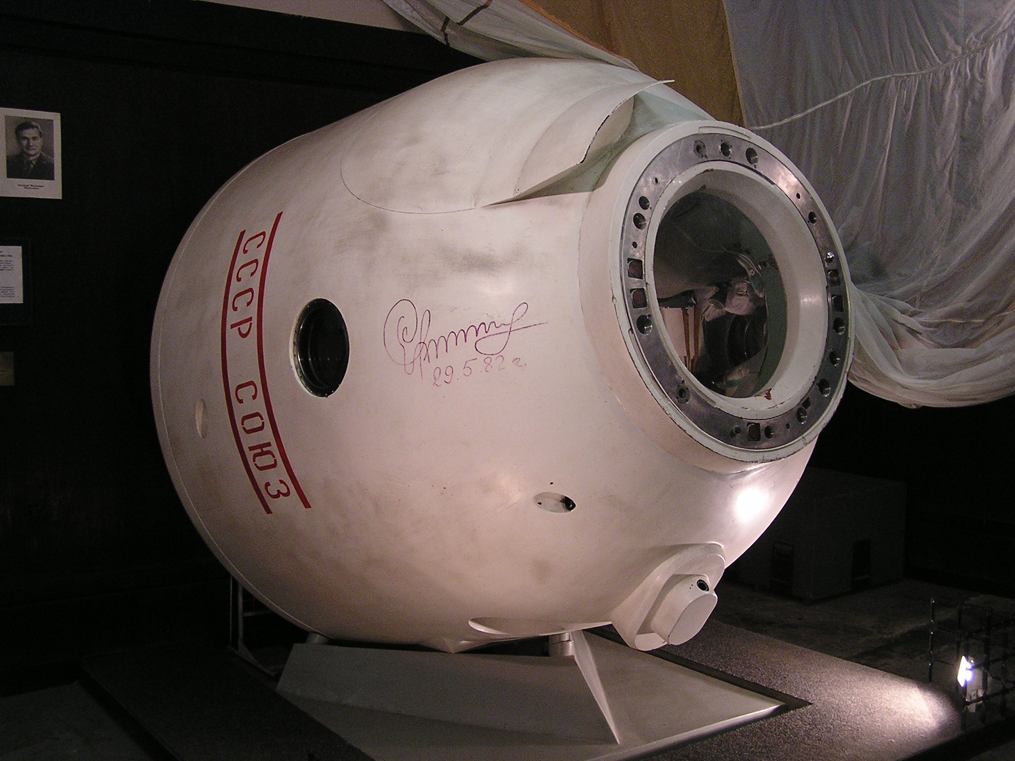 Музей космонавтики и ракетной техники (в Иоанновском равелине Петропавловской крепости). Спускаемый аппарат космического корабля Союз-16 This photograph was taken in Museum of Space and Missile Technology (Saint Petersburg) Object location59° 57′ 07″ N, 30° 19′ 16″ E